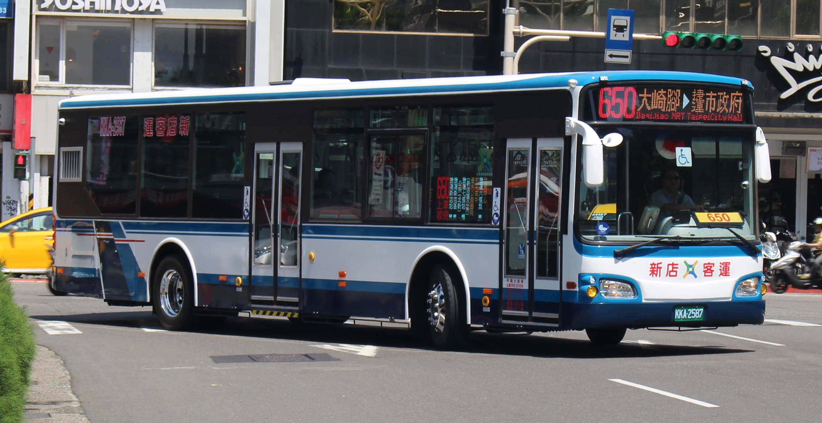 新店客運 2018 HINO HS8JRVL-UTF KKA-2587